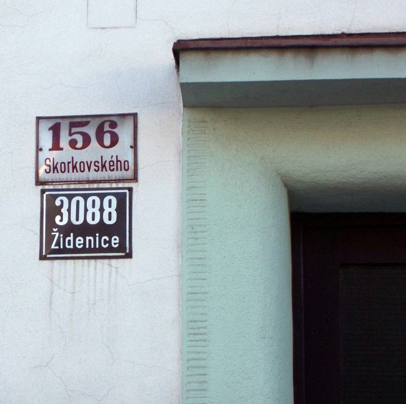 První cedule uvádí orientační číslo a název ulice. Druhá cedule uvádí popisné číslo a název katastrálního území, v němž se nalézá příslušný dům či jiná budova.